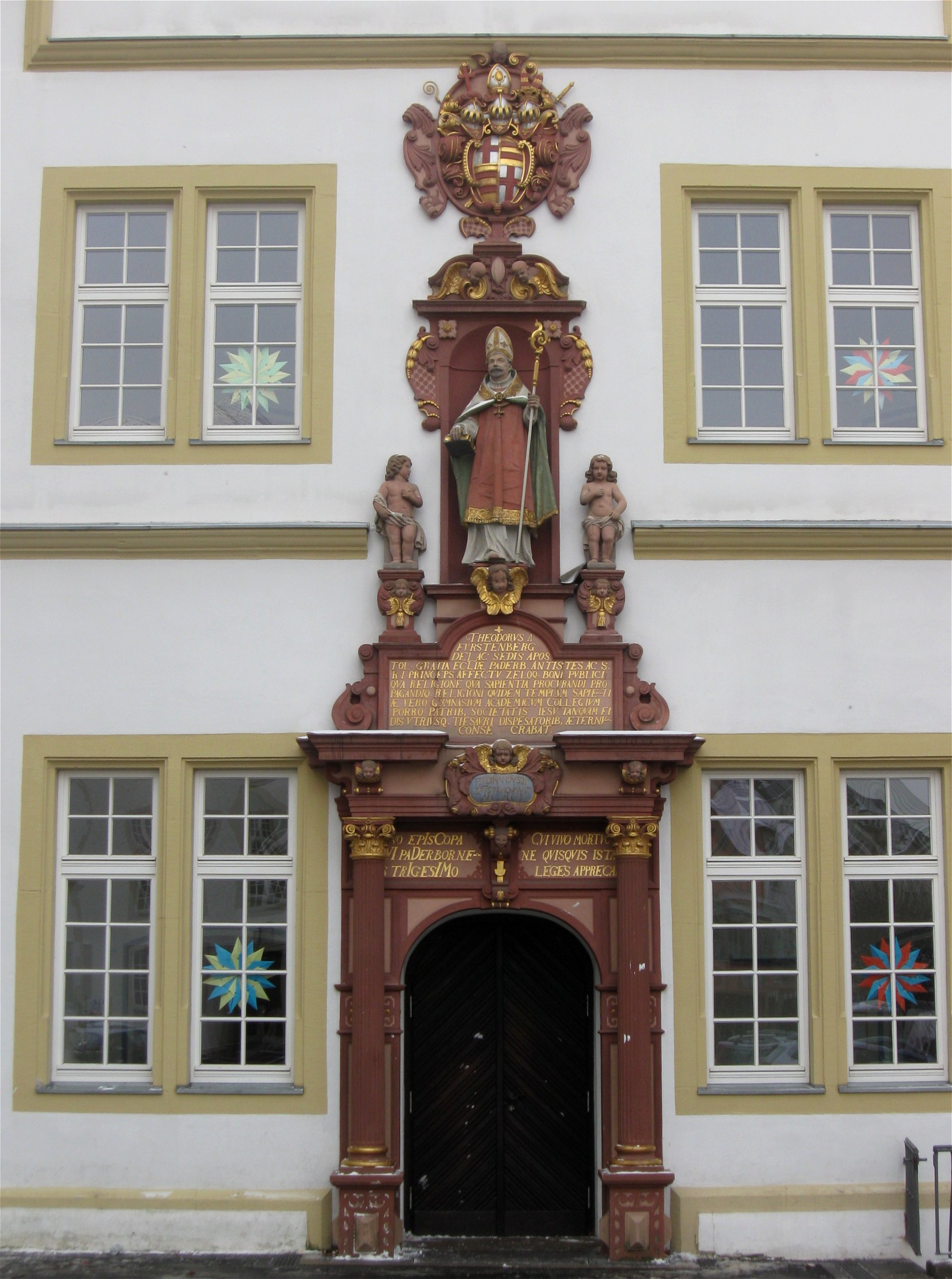 Gymnasium Theodorianum, Paderborn